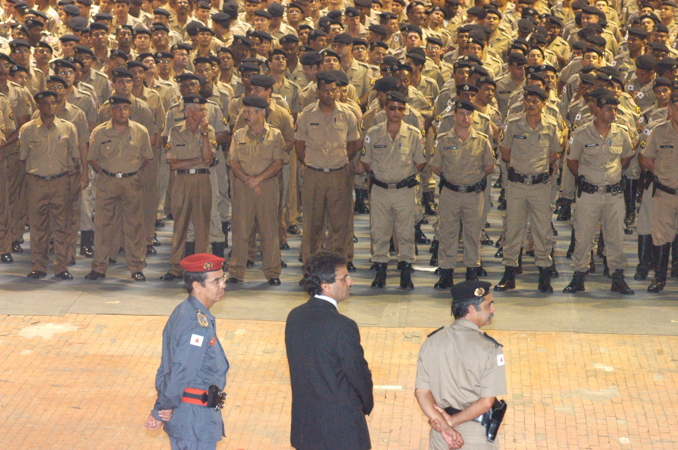 O governador Aécio Neves preside solenidade de promoção por tempo de serviço de Soldados a Cabos da Polícia Militar de Minas Gerais (PMMG) e do Corpo de Bombeiros Militar de Minas Gerais (CBMMG).